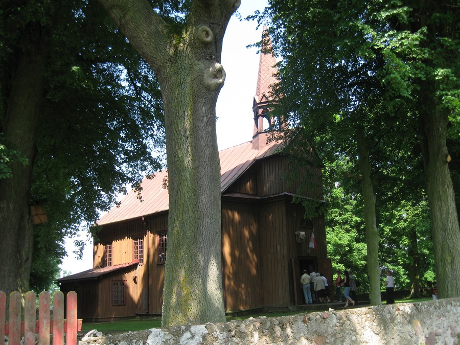 Giełczyn, kościół